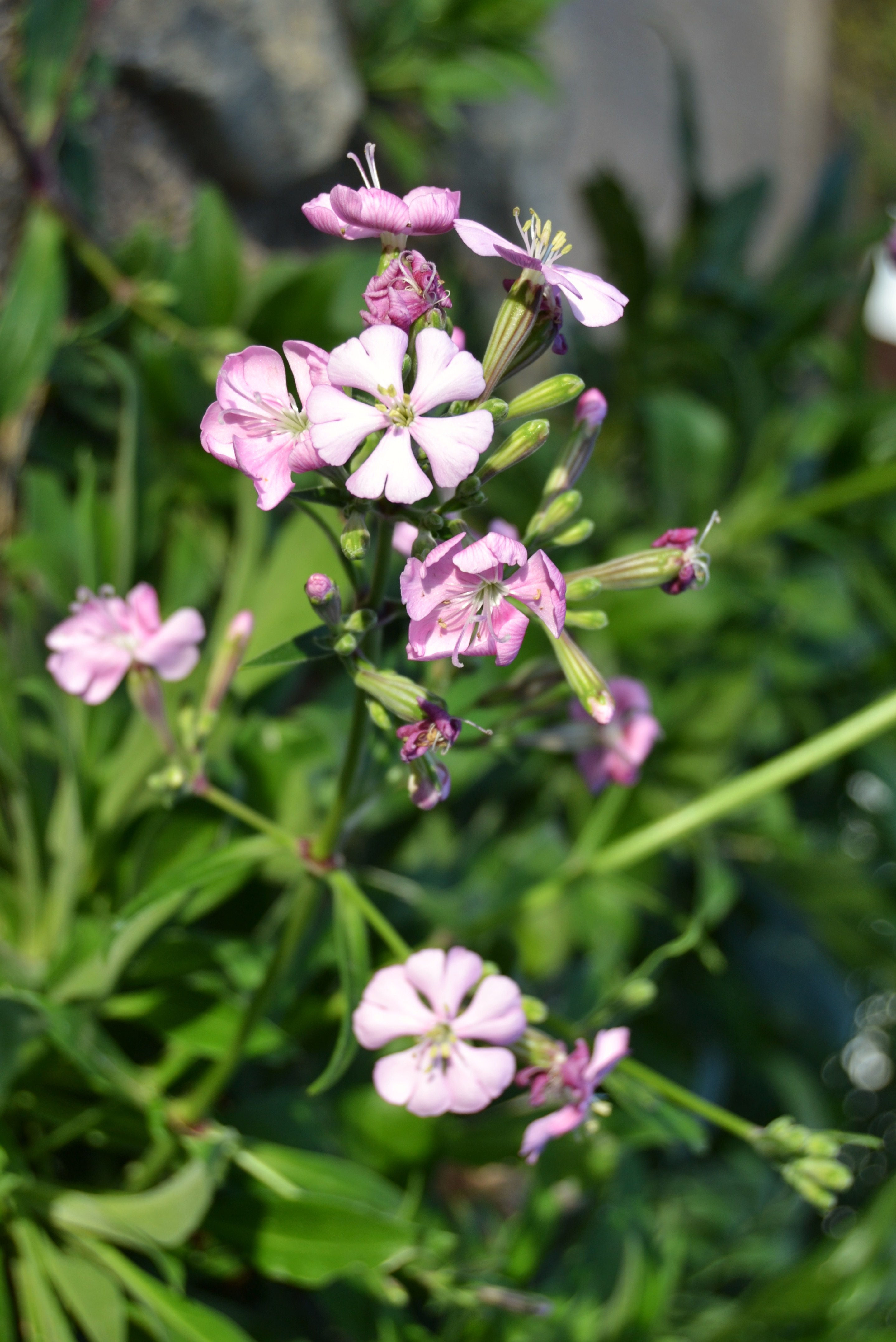 Flors d'esclafidora d'Ifac, Silene hifacensis, al jardí botànic de València.